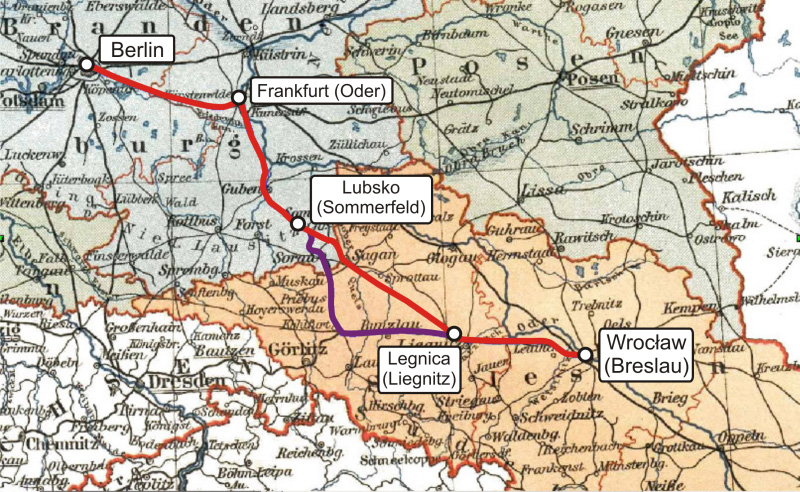 Verlauf der Niederschlesisch-Märkischen Eisenbahn